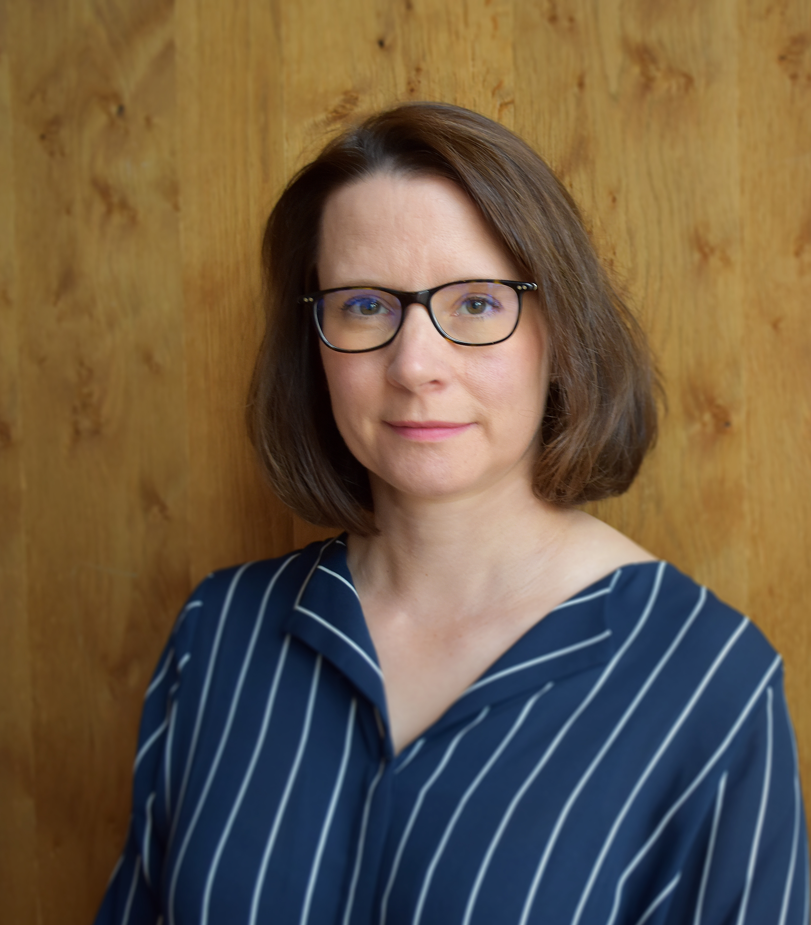 Simone Eick (* 1972), deutsche Historikerin und Migrationsforscherin sowie seit 2006 Leiterin des Deutschen Auswandererhauses in Bremerhaven, Deutschland.